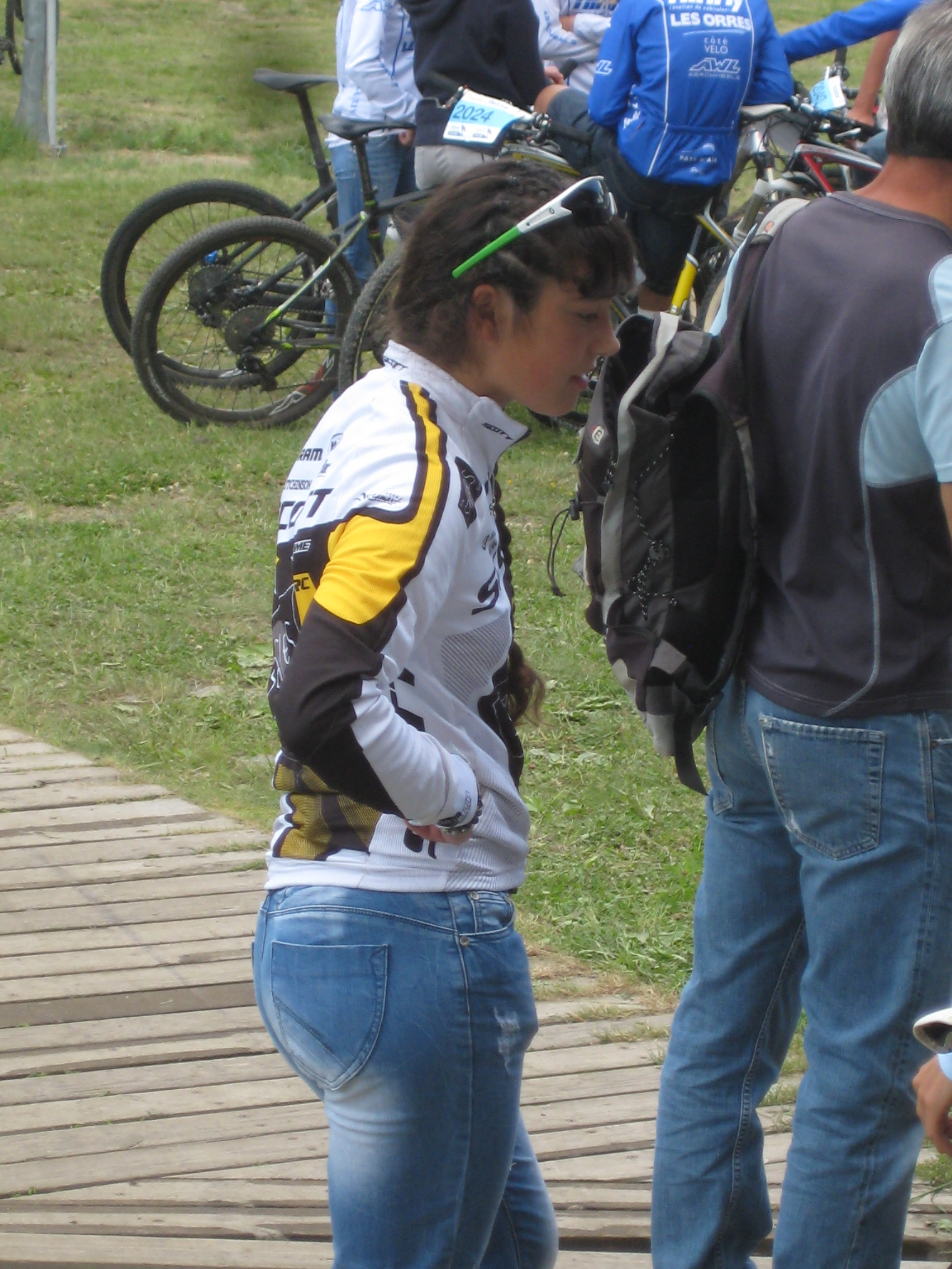 Margot Moschetti, manche de Super-Besse de la coupe de France de VTT 2012